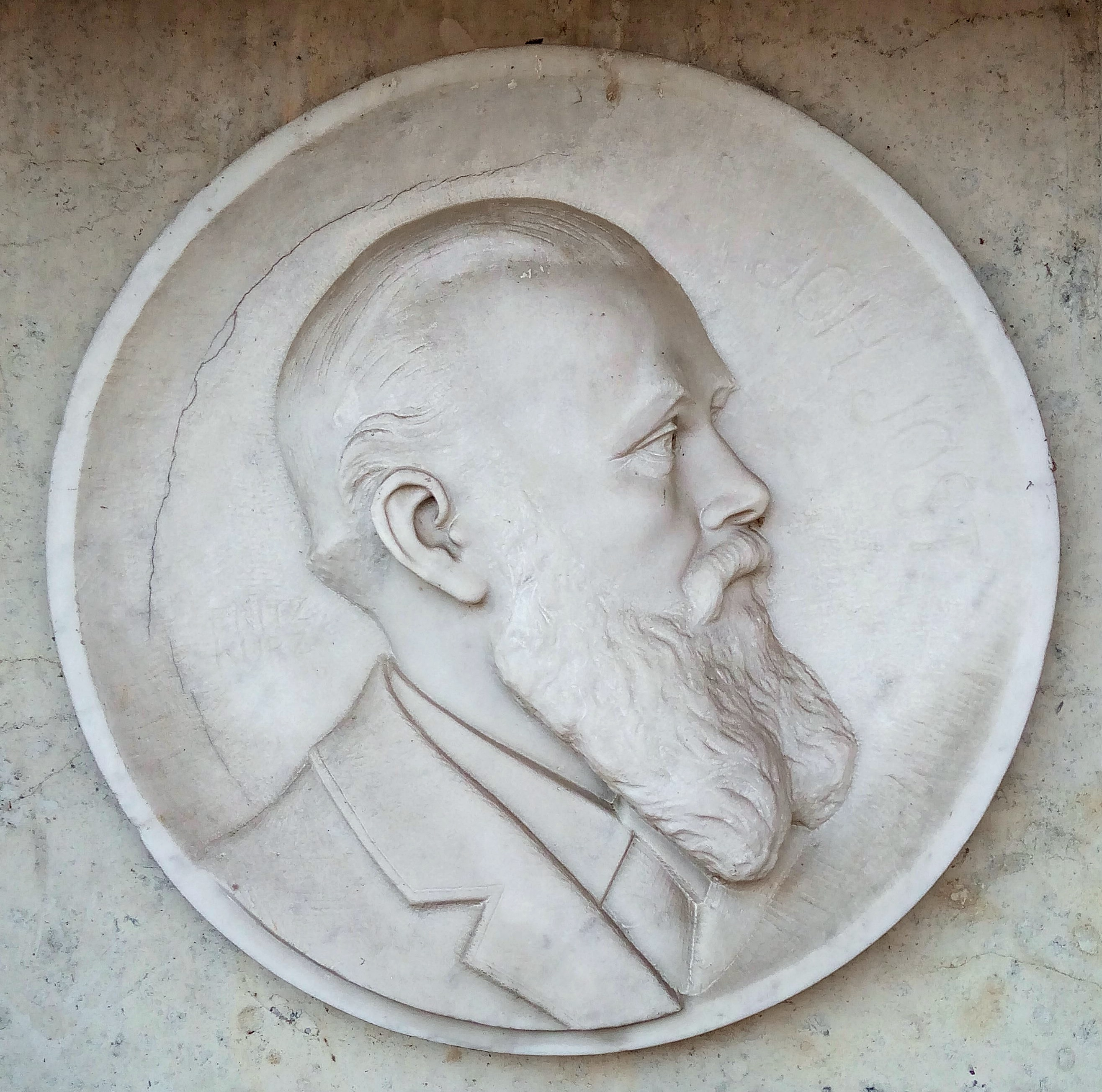 Johannes Jost (1850-1916), Brauereibesitzer, Portraitmedaillon Grab, Friedhof Grünstadt